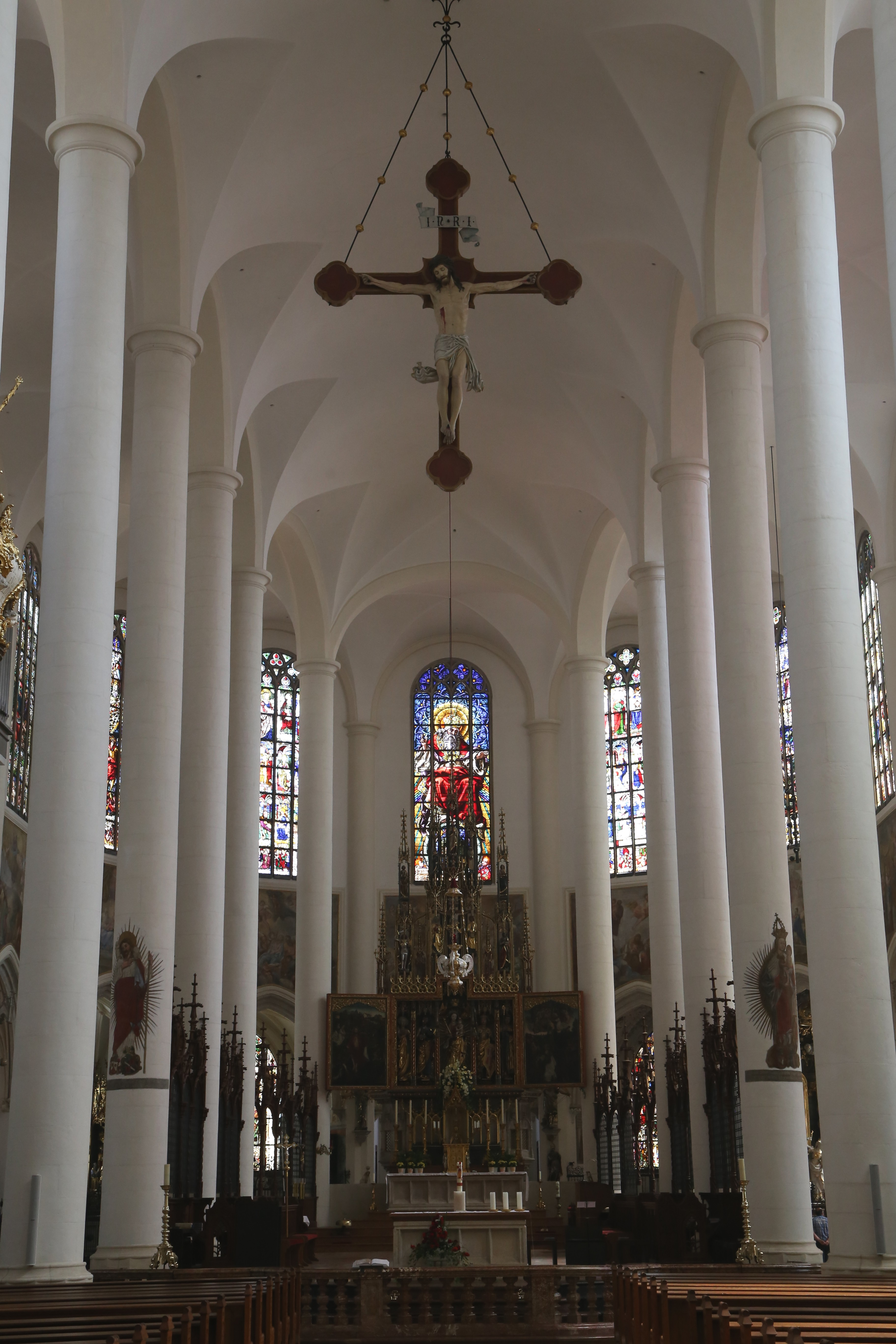 Pfarrplatz 21, Straubing; Katholische Stadtpfarrkirche St. Jakob, dreischiffige Hallenkirche mit Steildach und umlaufendem Kapellenkranz, fünfseitig geschlossen, mächtiger Westturm, spätgotisch, um 1415 begonnen von Hans von Burghausen, Chor um 1418, um 1500 Vollendung Langhaus, um 1590 Vollendung Turm, Erneuerungen nach Stadtbrand 1780; mit Ausstattung